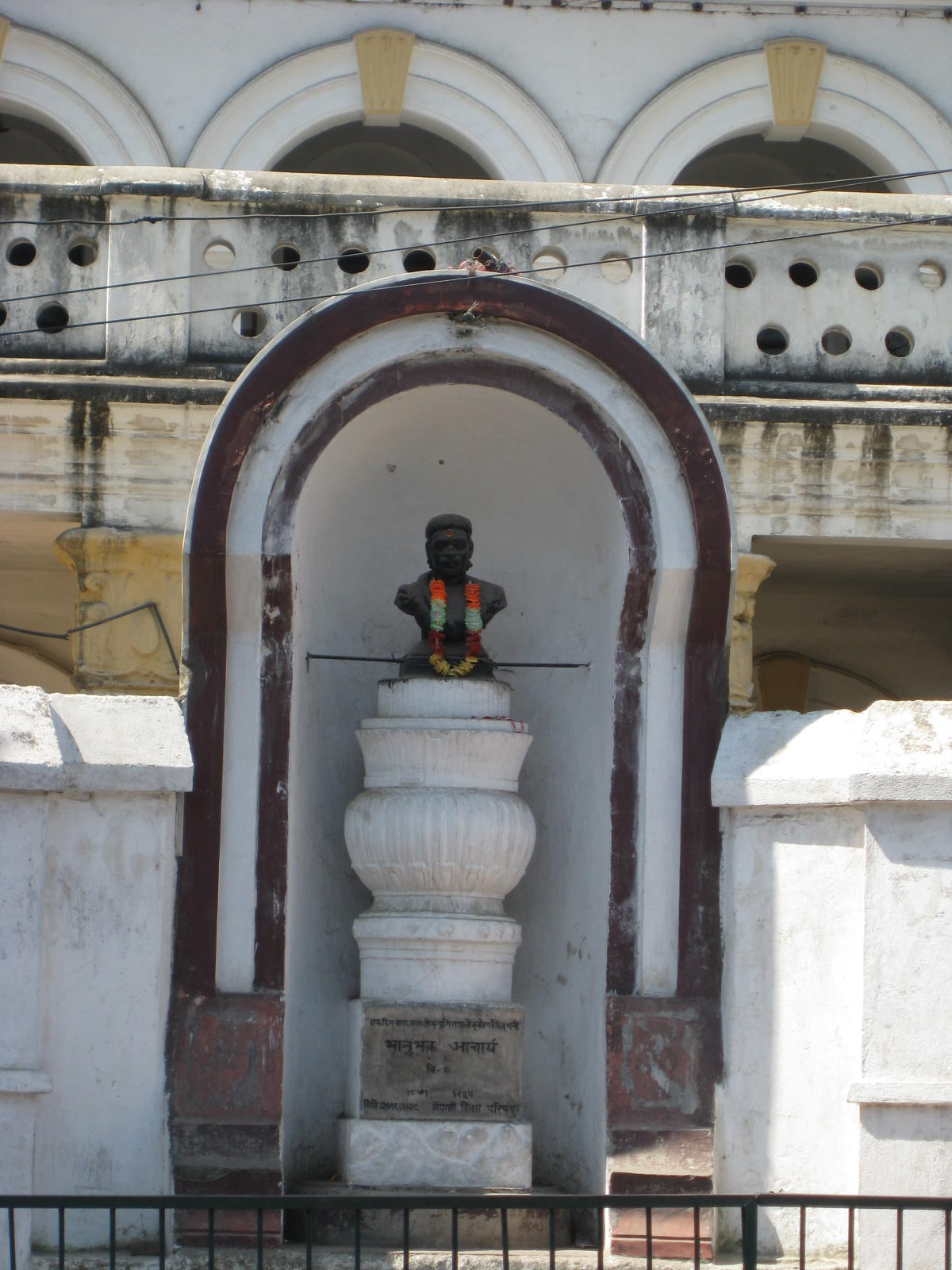 カトマンズ市内のダルパール・ハイスクールのビルの前に建てられているヌバクタ・アーチャーリャの像